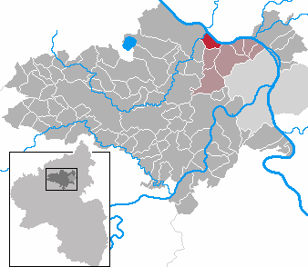 de: in Rhineland-Palatinate - district Mayen-Koblenz